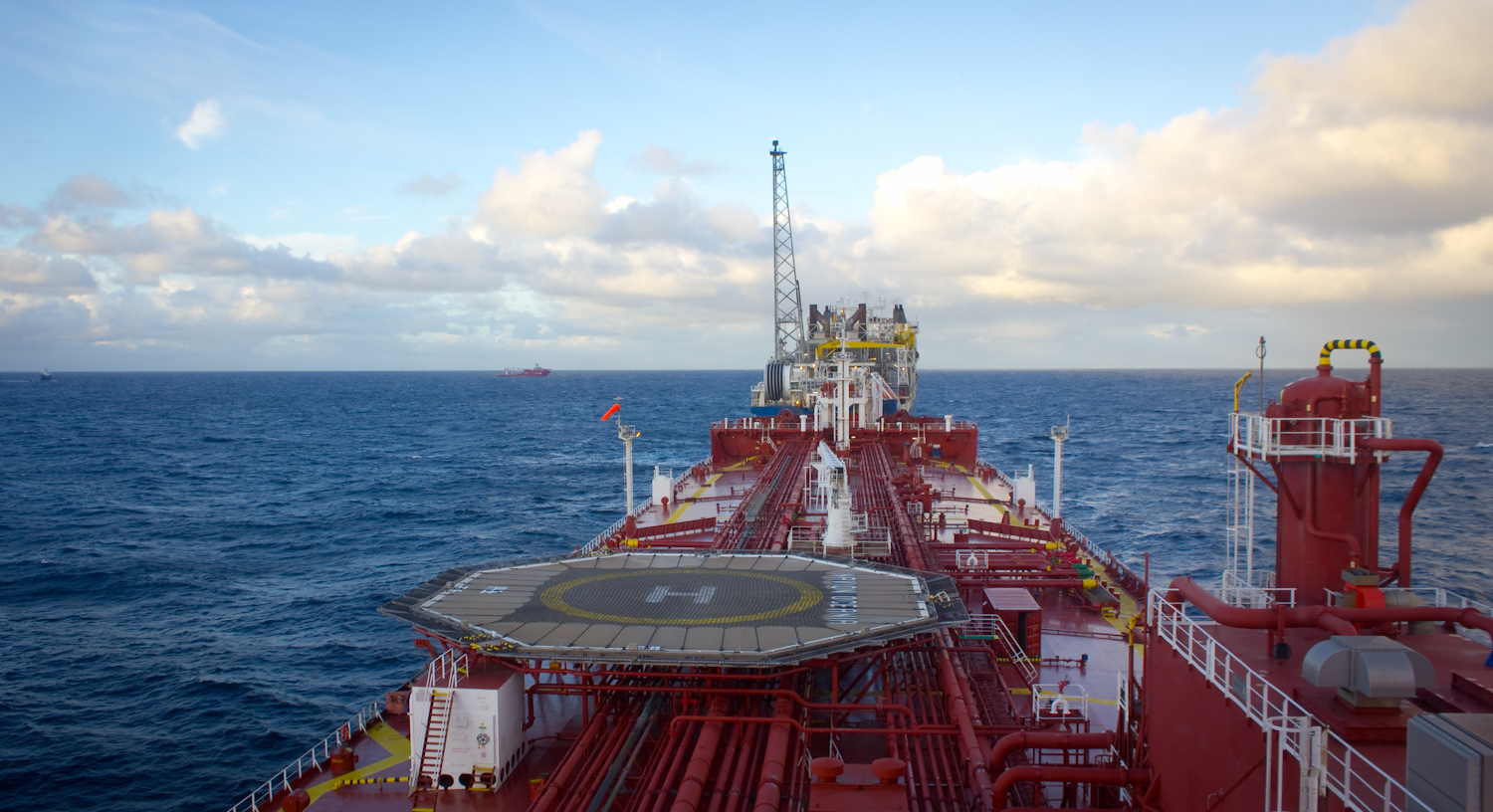 A shuttle tanker approaching the Alvheim FPSO in the North Sea